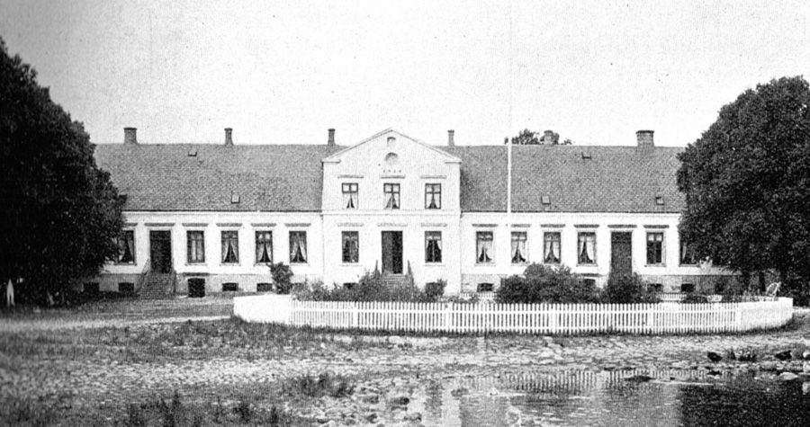 Rødkilde er en af landets ældste gårde, og sit navn skylder den de jernholdige kilde i dens have og på dens marker. Allerede på Erik Menveds tid nævnes gården. Rødkilde ligger i Ulbølle Sogn, Sallinge Herred, Svendborg Kommune. Hovedbygningen er opført i 1854.